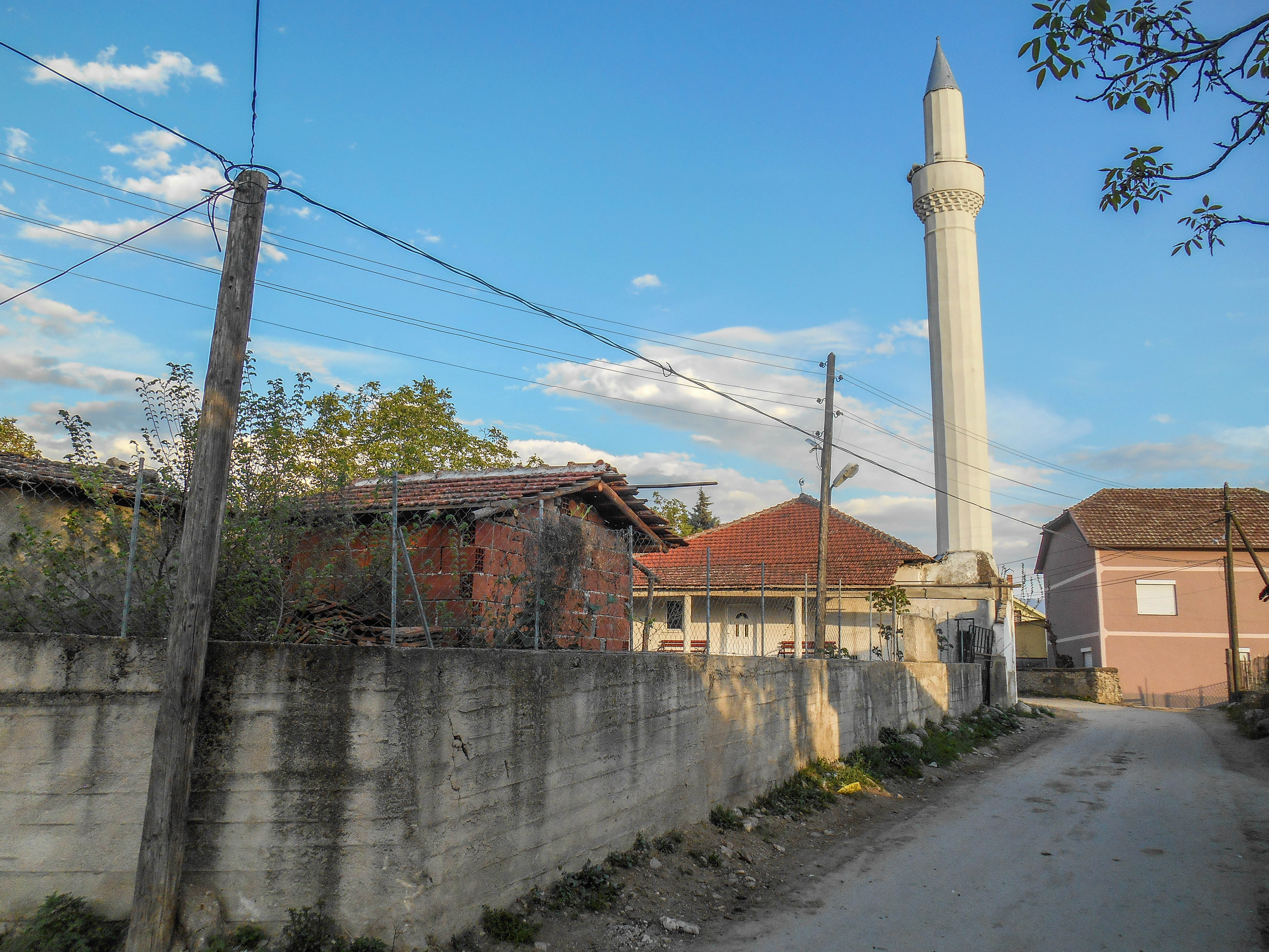 Џамија во Иловица